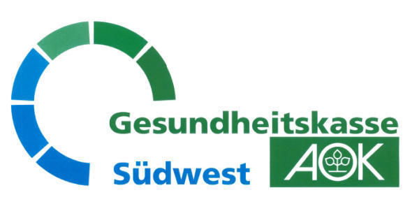 Logo Gesundheitskasse Südwest: Variante 2